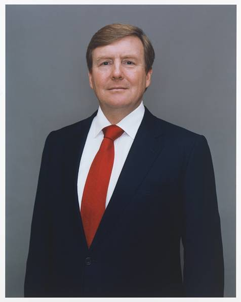 In april 2013 maakte Koos Breukel staatsiefoto's van Koning Willem-Alexander. In september van dat jaar gaven het ministerie van OCW en de Rijksvoorlichtingsdienst aan het Mondriaan Fonds de opdracht om de totstandkoming van drie staatsieportretten te begeleiden. Na een uitgebreide voorselectie werden in januari 2014 drie kunstenaars geselecteerd die een staatsieportret van de Koning mochten maken: Iris van Dongen, Rineke Dijkstra en Femmy Otten. Minister Bussemaker van OCW presenteerde de kunstwerken op 24 april 2014 in Paleis Het Loo.